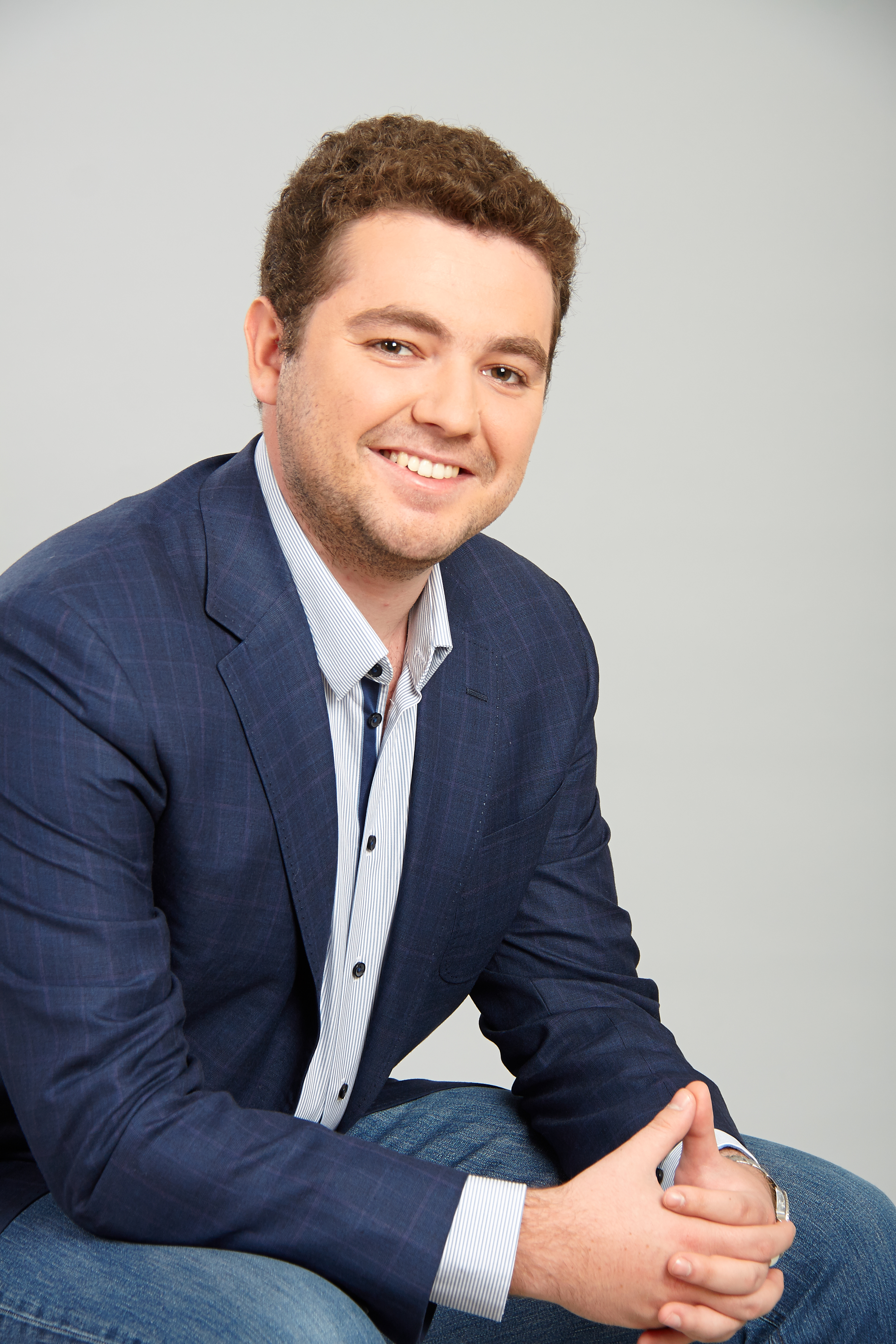 Артур Ермолаев, Президент Федерации киберспорта Украины